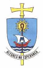 Stemma Vescovo di Santos